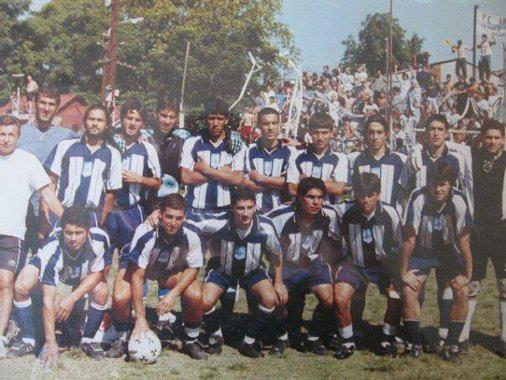 CLASICO EN VILLA LYNCH